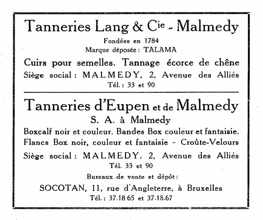 Encart publicitaire des tanneries Lang.